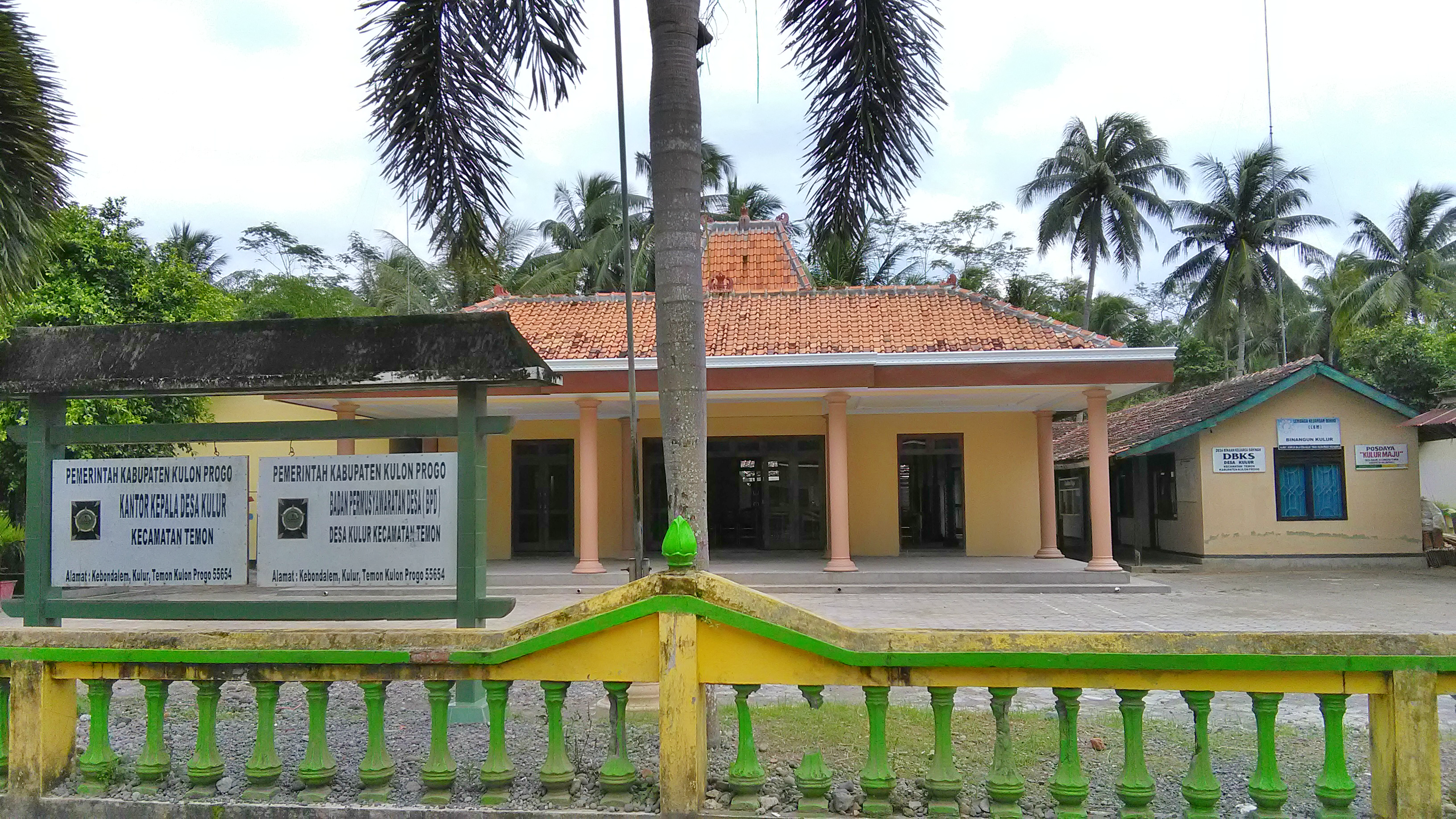 Balai Desa Kulur dan Kantor Kepala Desa Kulur yang terletak di Pedukuhan Kebondalem, Desa Kulur, Kecamatan Temon, Kabupaten Kulon Progo